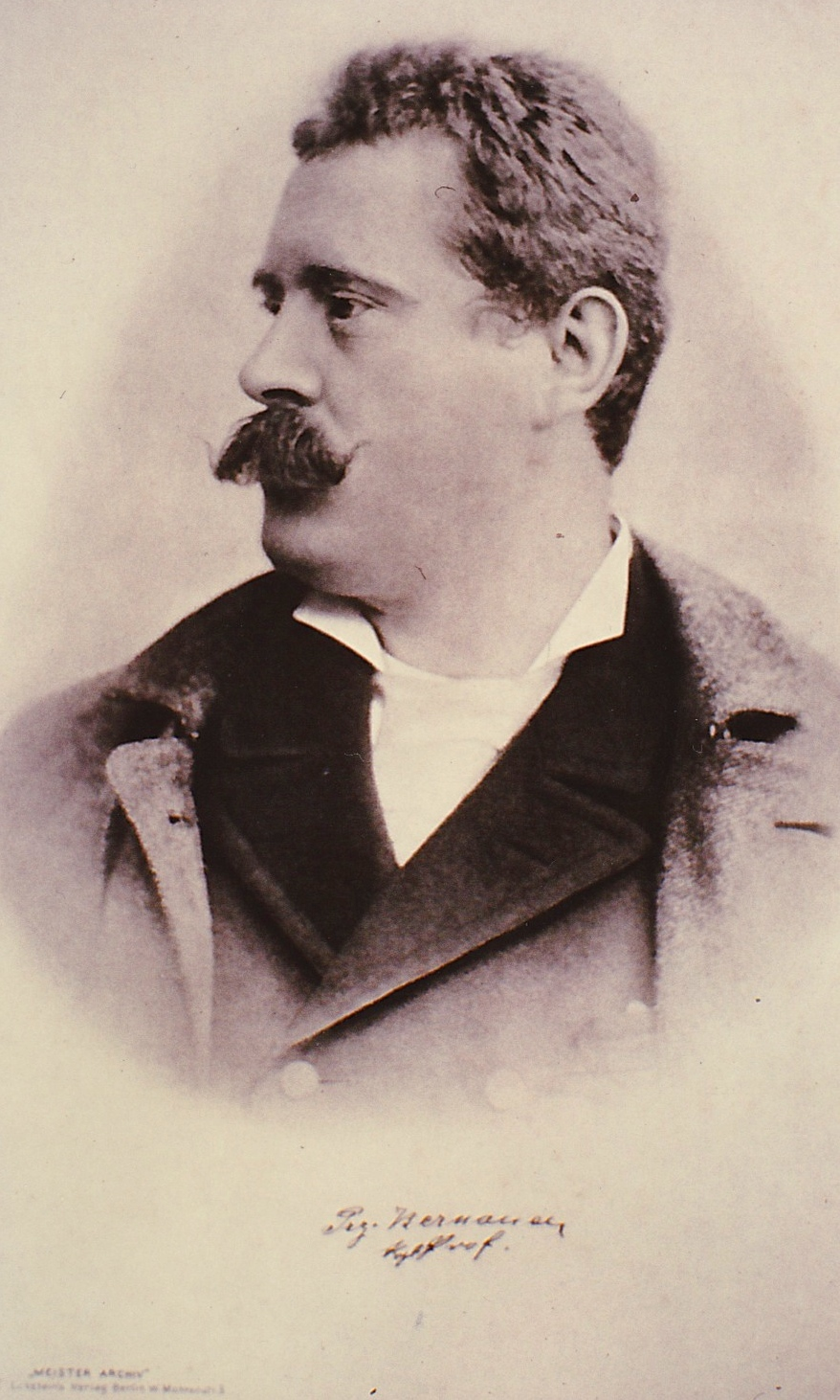 Fotografie des Münchner Bildhauers Franz Bernauer. Er schuf unter anderem den Prinzregentenbrunnen in Augsburg sowie den Germanenbrunnen in München.